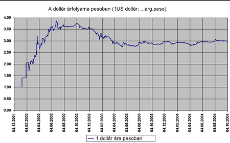 A dollár árfolyama argentin pesóban 2001 decembere és 2004 októbere között